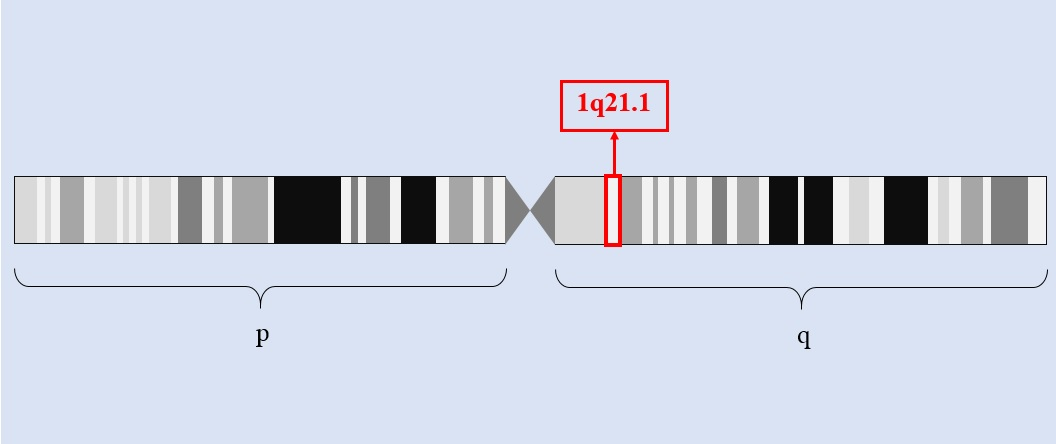 Cromàtida amb el locus del gen TXNIP marcat.